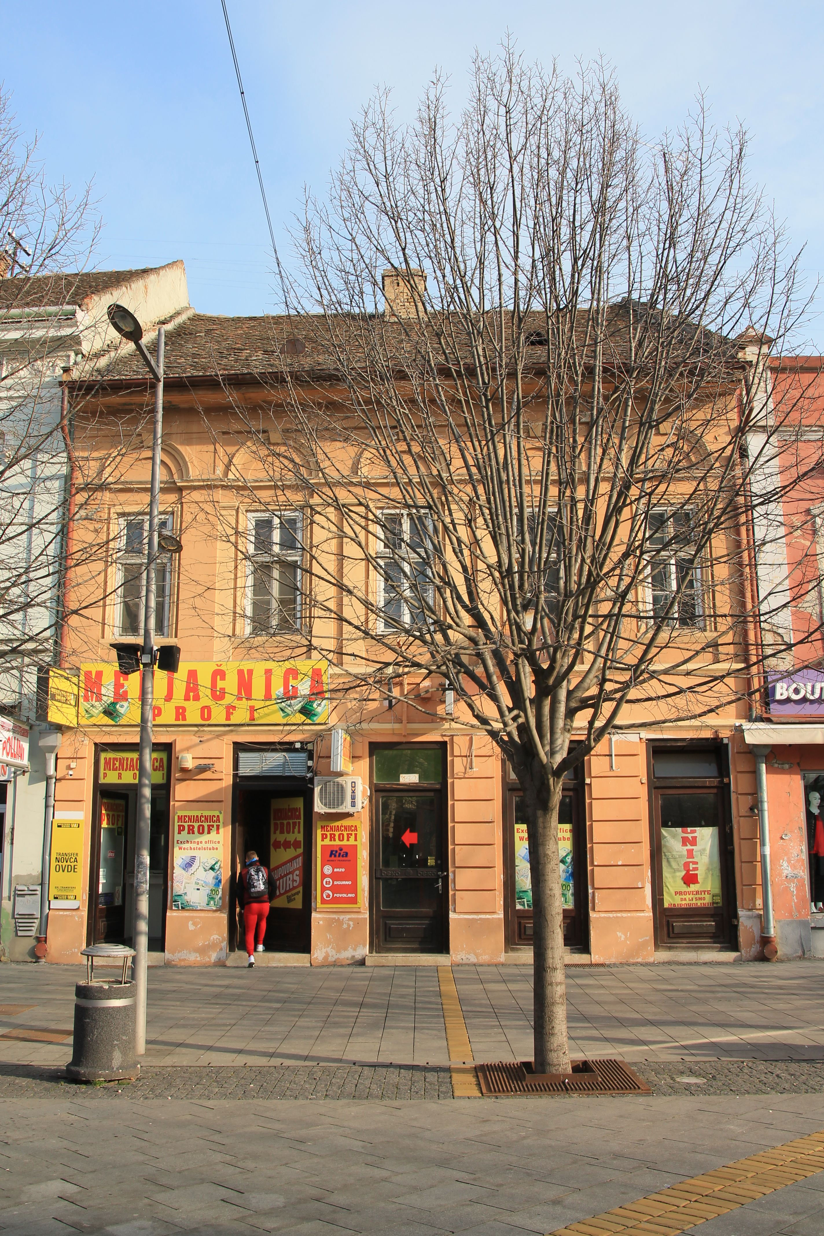 Staro jezgro Zrenjanina